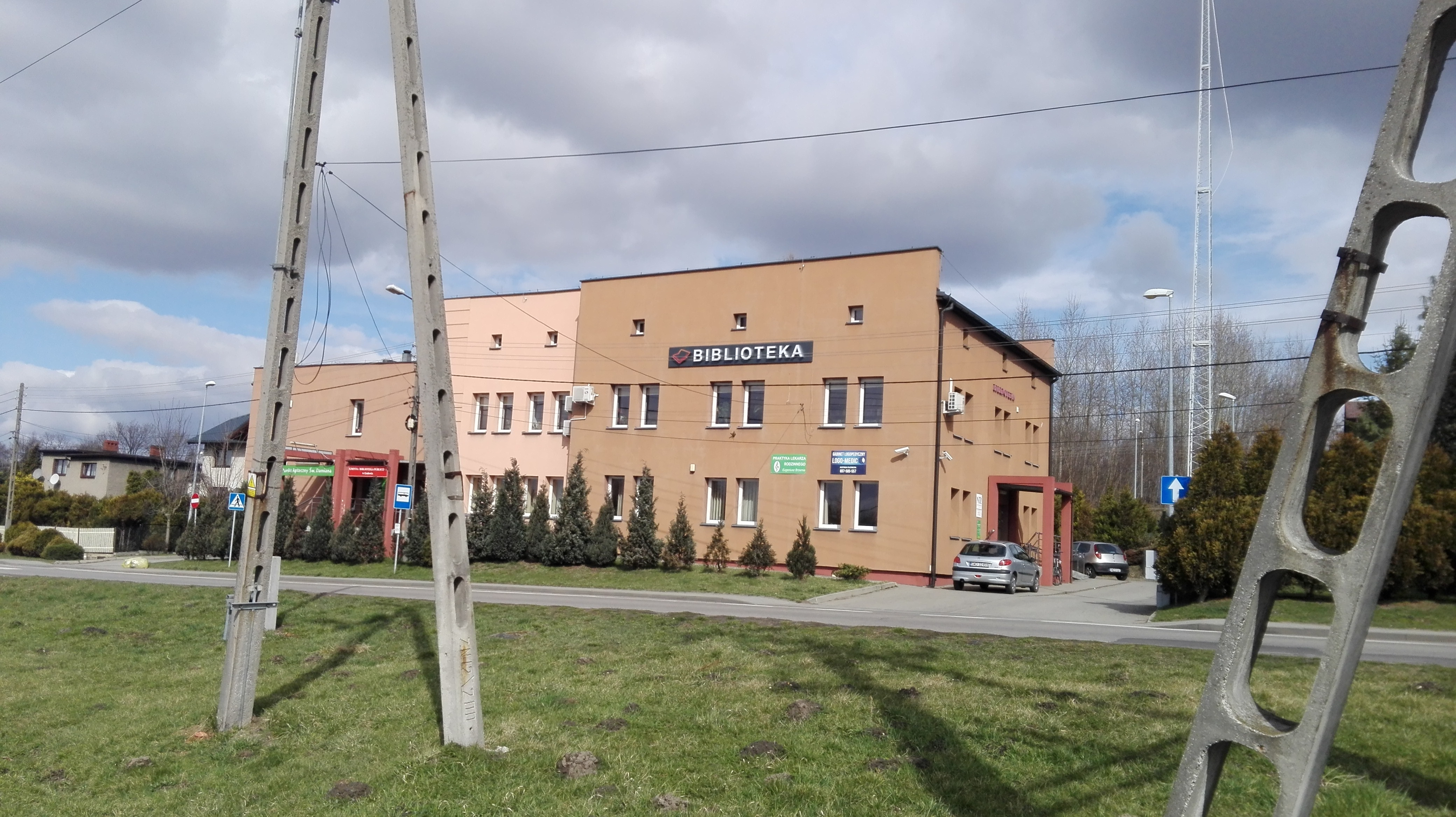 Godów, Gminna Biblioteka Publiczna. Dawniej Strażnica Wojsk Ochrony Pogranicza (WOP), następnie Straży Granicznej (SG).